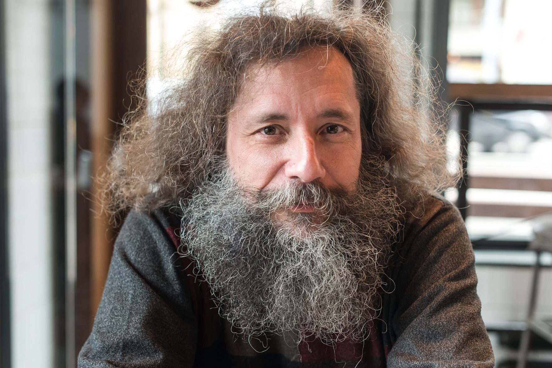 Михаил Сергеевич Гельфанд (род. 25 октября 1963) — российский биоинформатик и генетик, доктор биологических наук, кандидат физико-математических наук (биофизика), профессор факультета биоинженерии и биоинформатики МГУ, член Европейской Академии, заместитель директора Института проблем передачи информации РАН. Член Общественного совета при Министерстве образования и науки РФ.